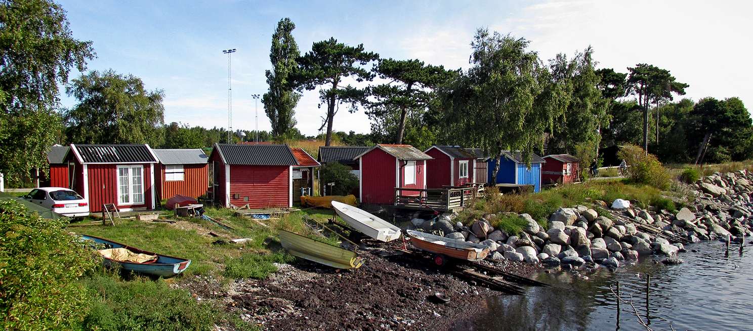 Sjöbodar vid Världens ände i Ystad. På "skånska" kallas dessa för Fiskehoddor, eller bara hodda.